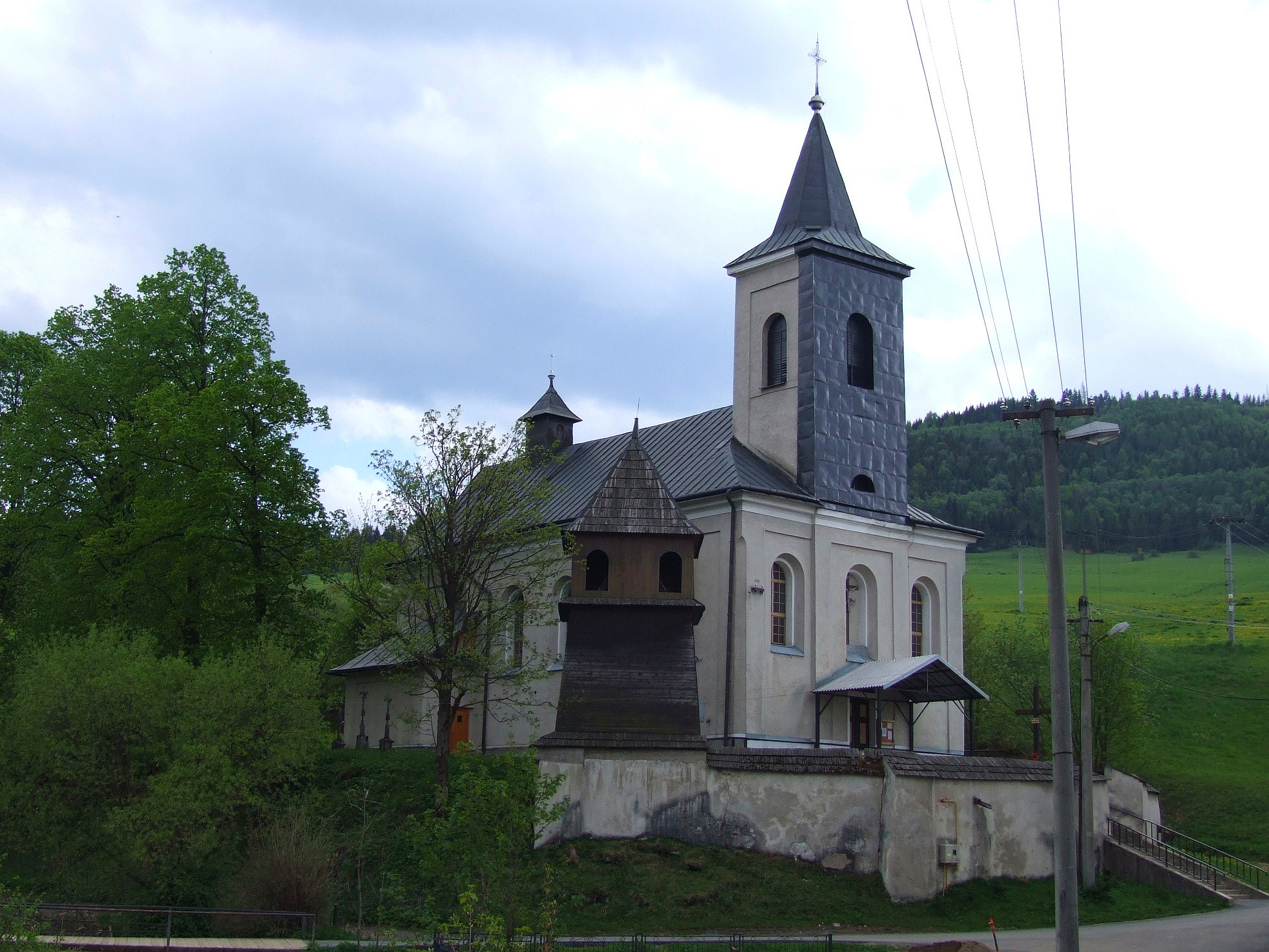 Veľká Franková church.